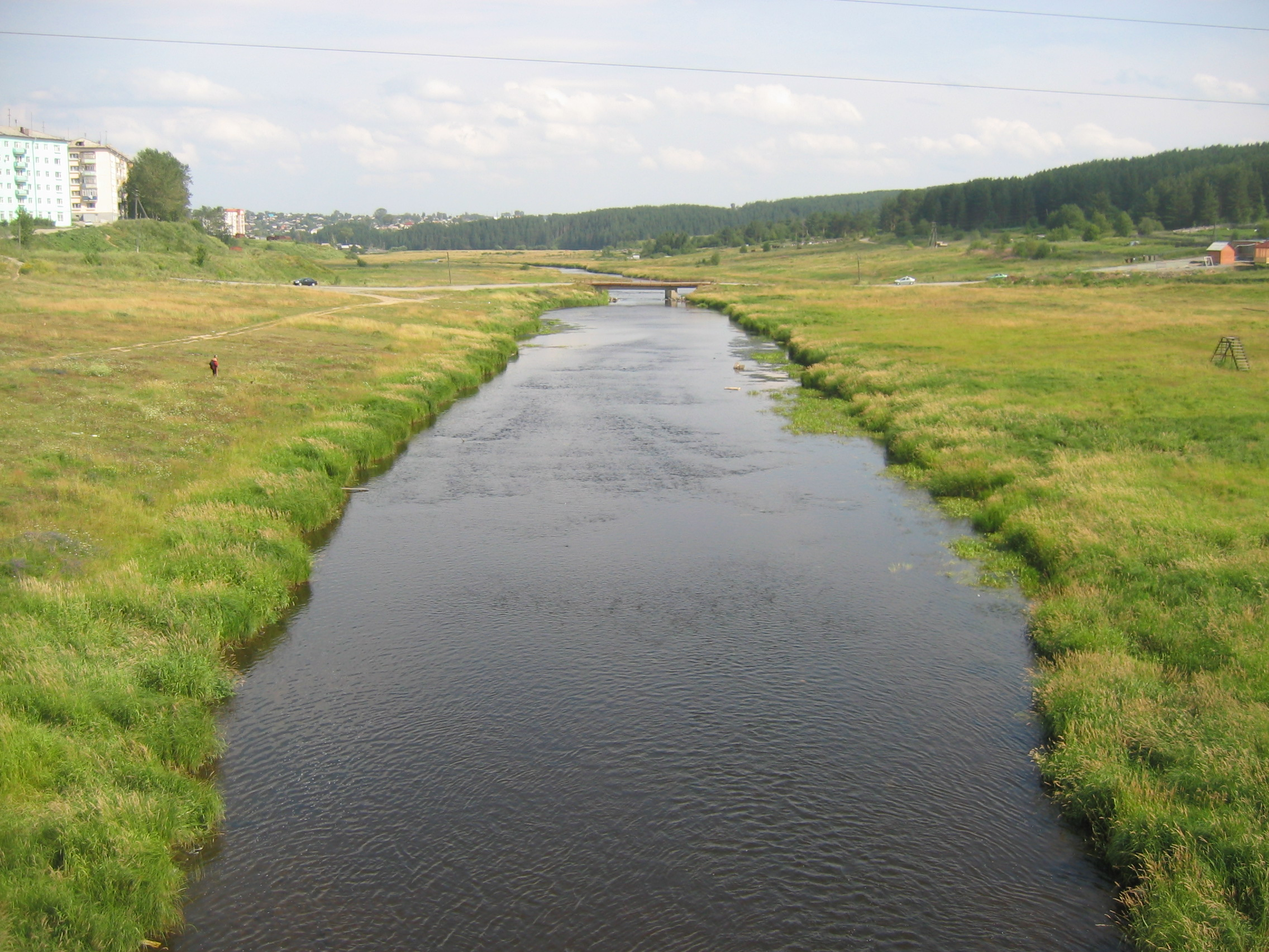 Река Турья (приток Сосьвы). Краснотурьинск, Свердловская область, Россия.